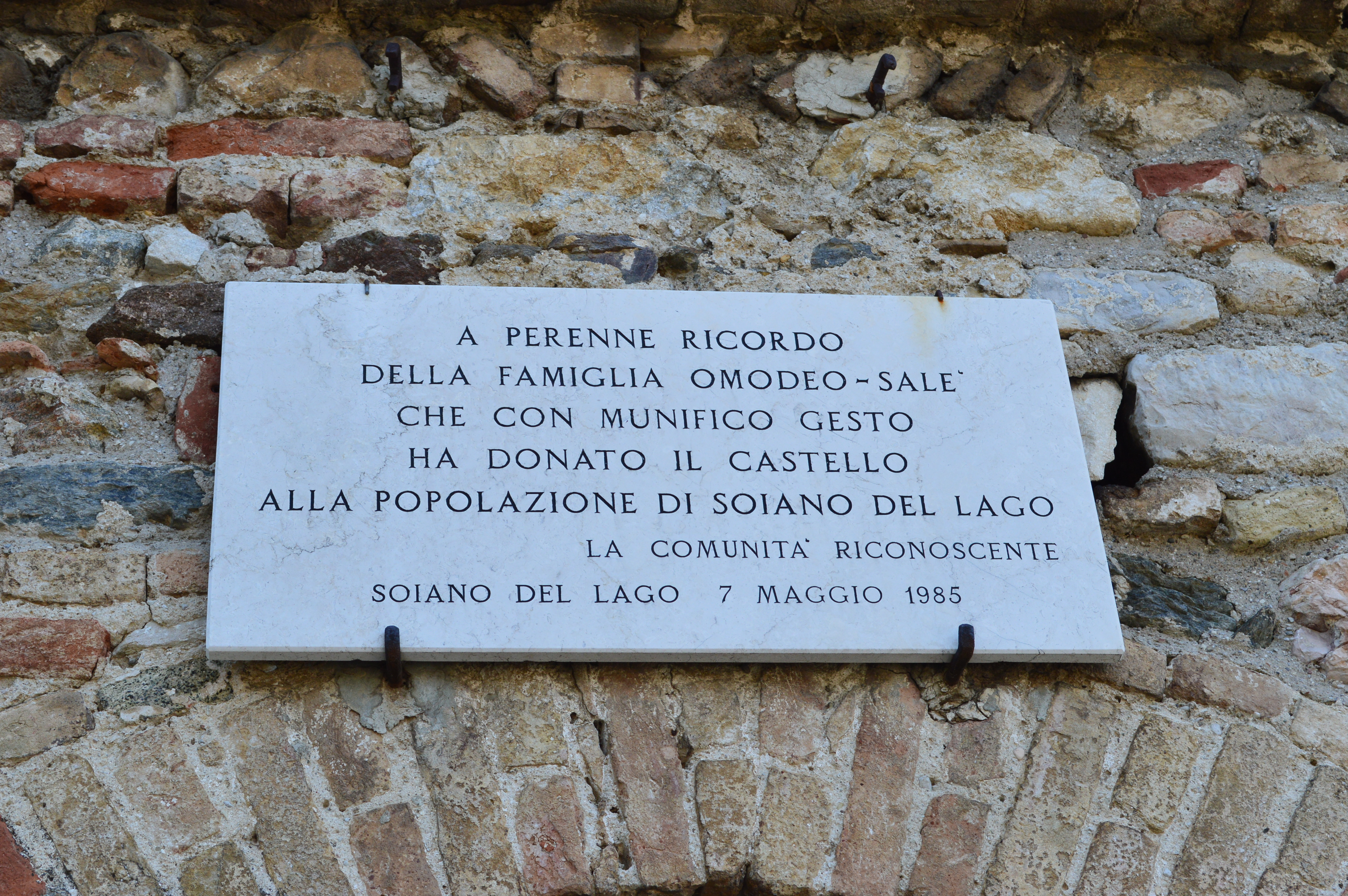 Targa presente all'ingresso del castello di Soiano del Lago (BS)